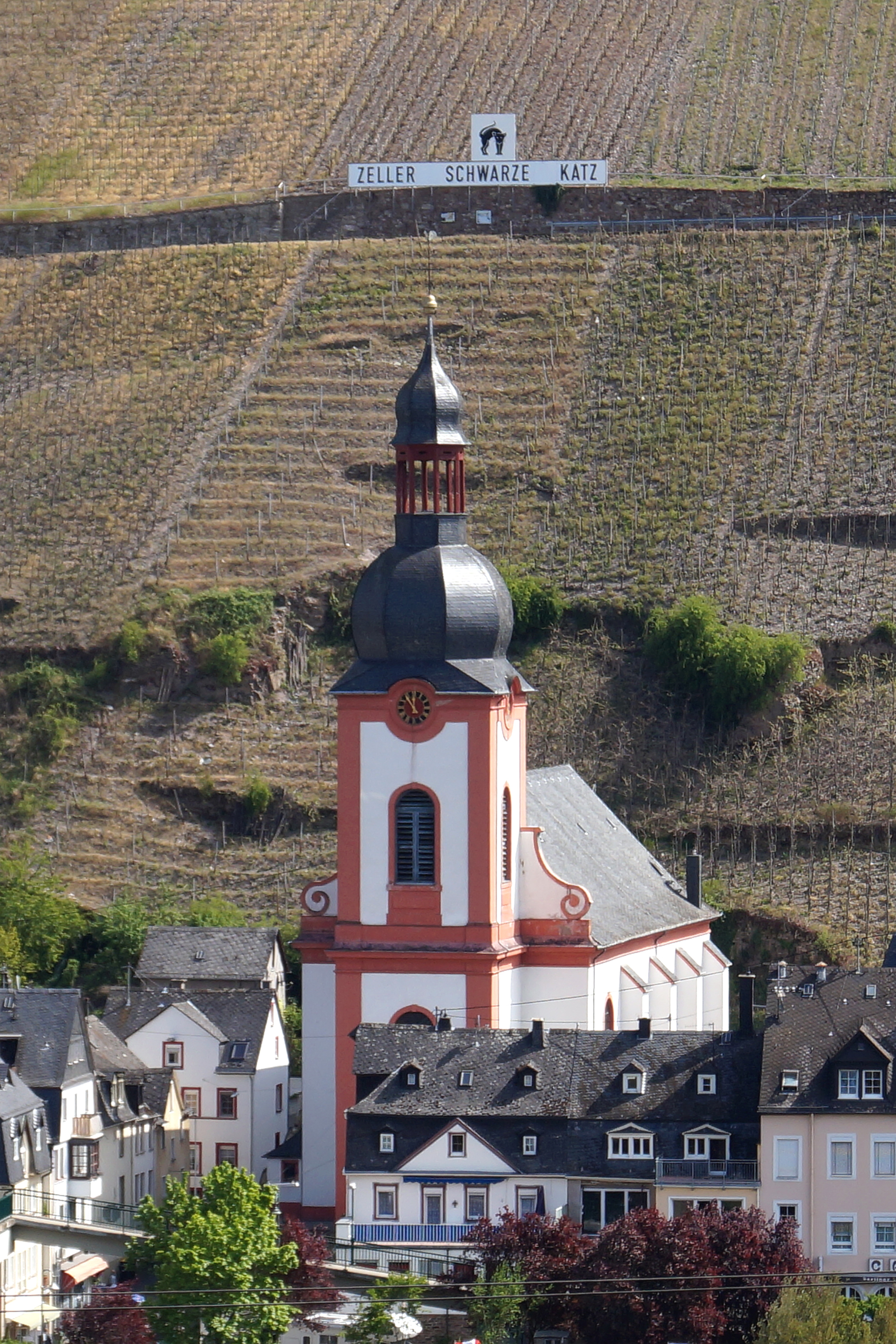 Deitsch: Großlage Schwarze Katz mit der St. Peter-Kirche in Zell